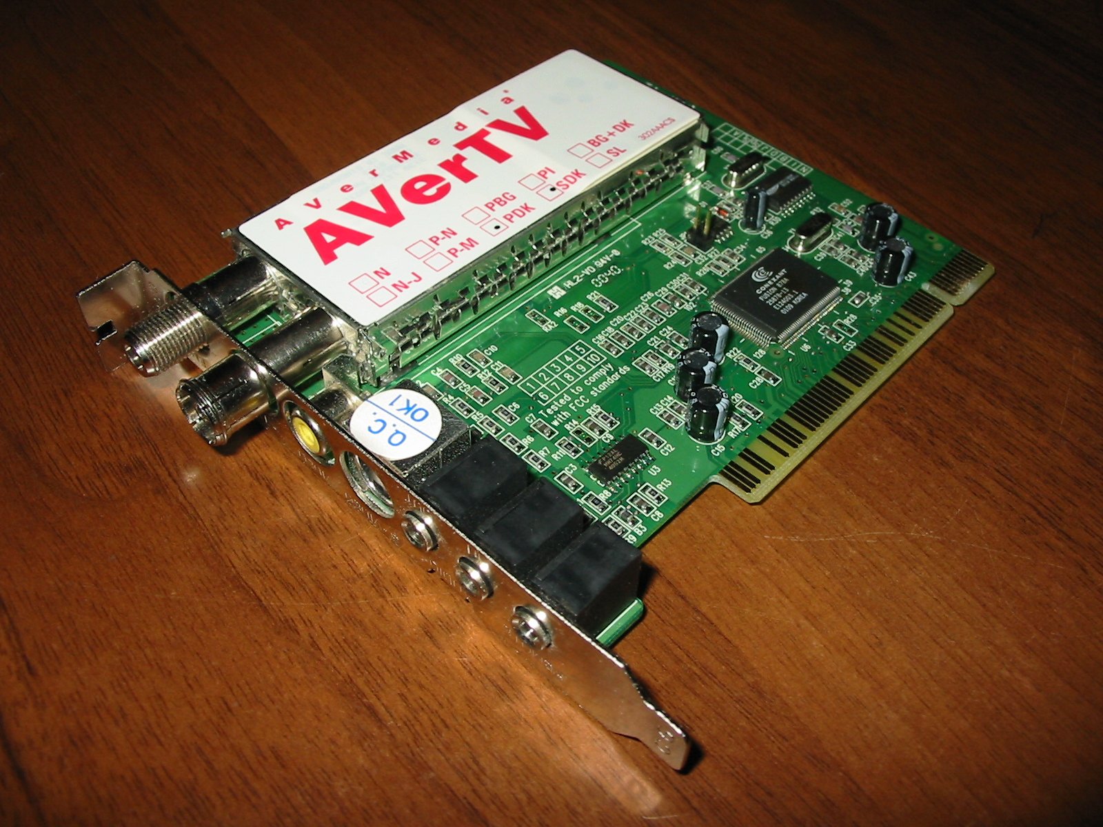 Фото ТВ-тюнера AVerTV Studio фирмы AVerMedia.